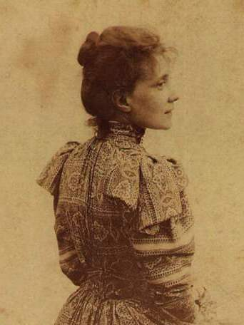 Elisa Guastalla Errera (1858-1945), dal 1900 moglie di Corrado Ricci